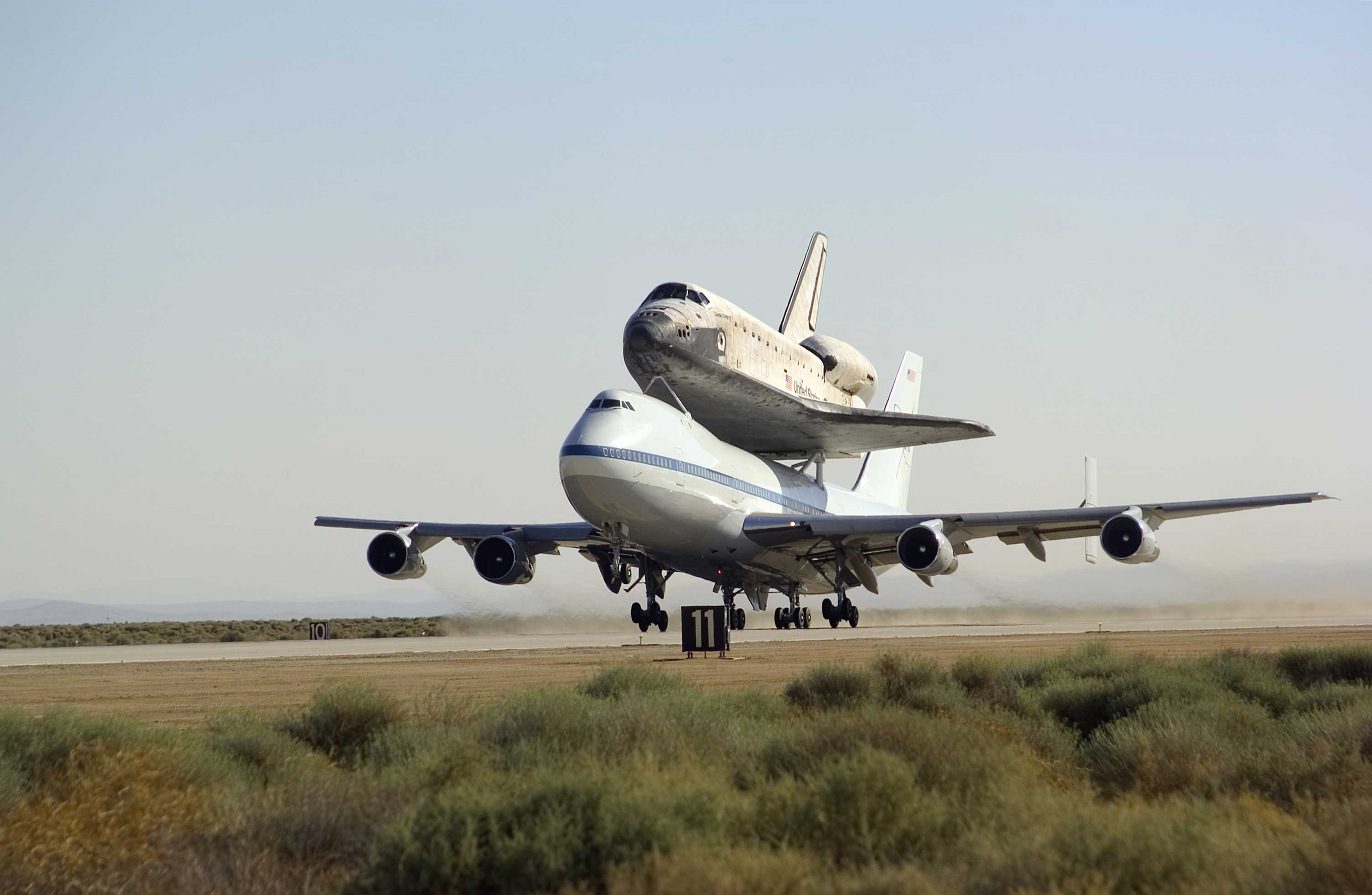 Überführung der Discovery nach Cape Canaveral im Anschluss an STS-114